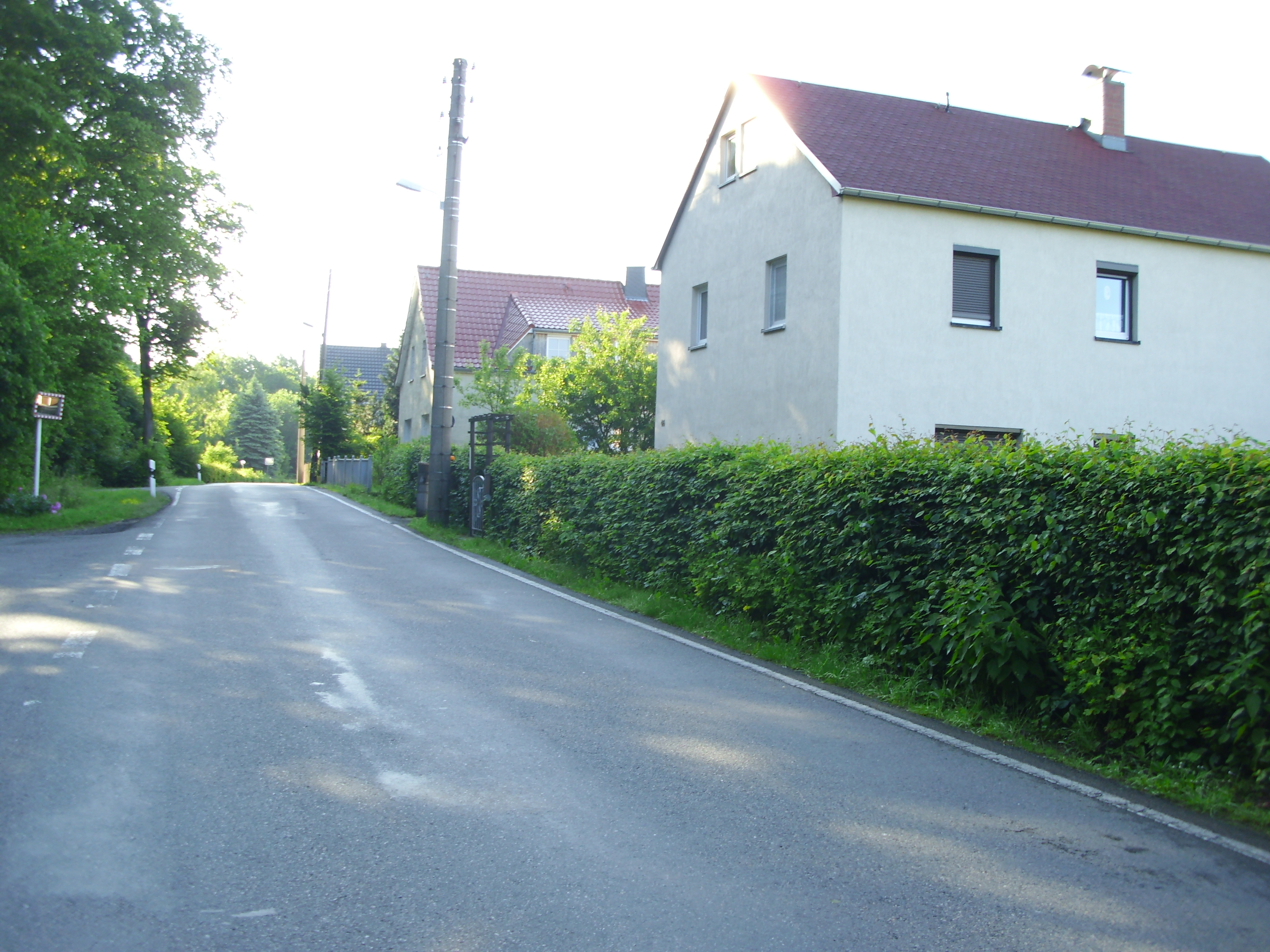 Dies sind de drei Poisenhäuser welche zu Obernaundorf gehören, und früher die Drescherhäuser vom Freigut Obernaundorf waren.